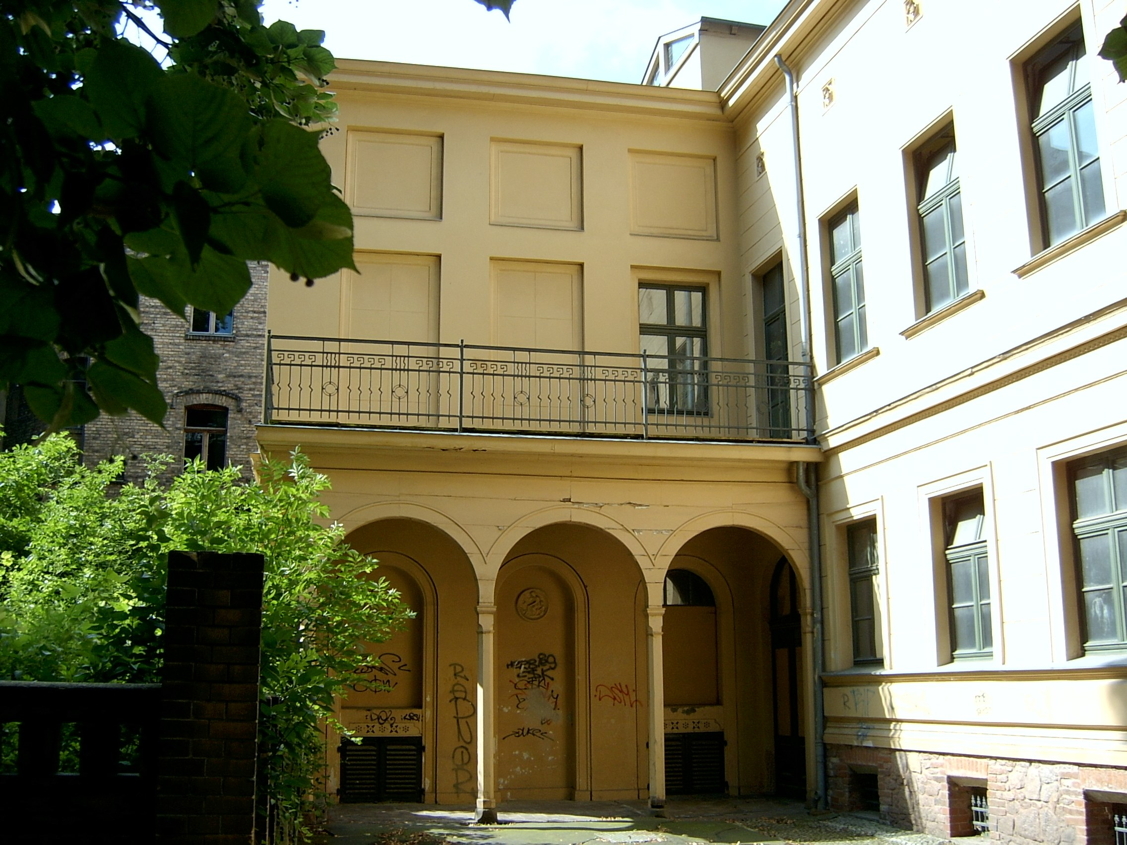 Hinteransicht der Großen Märkerstraße 11 in Halle (Saale)